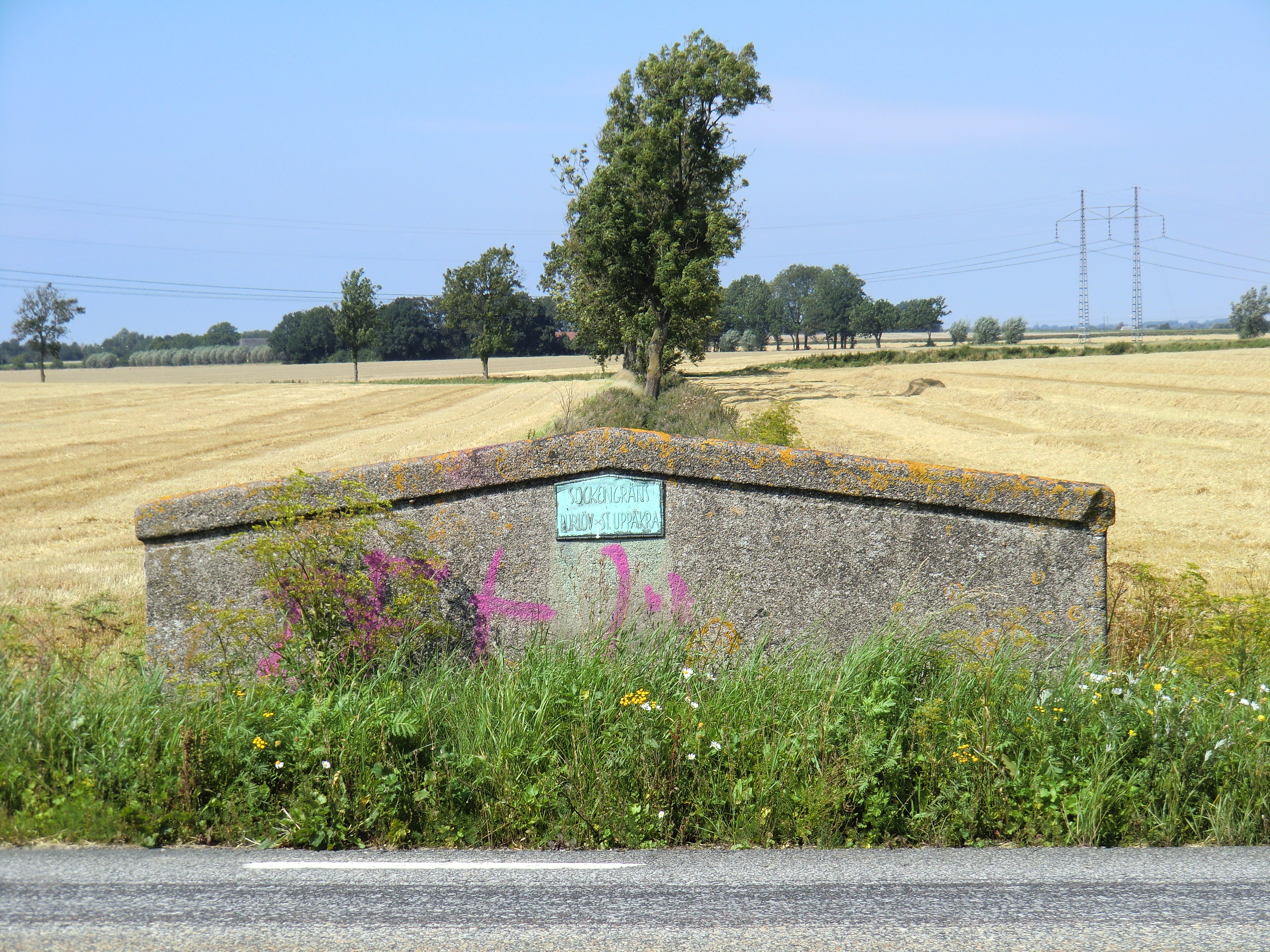 Gräns mellan Burlöv och Uppåkra socknar vid Gamla Lundavägen.